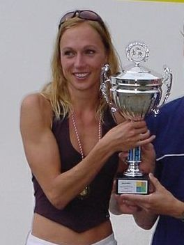 Wanderpokalübergabe an Alexander Mügge und Laura Bieger